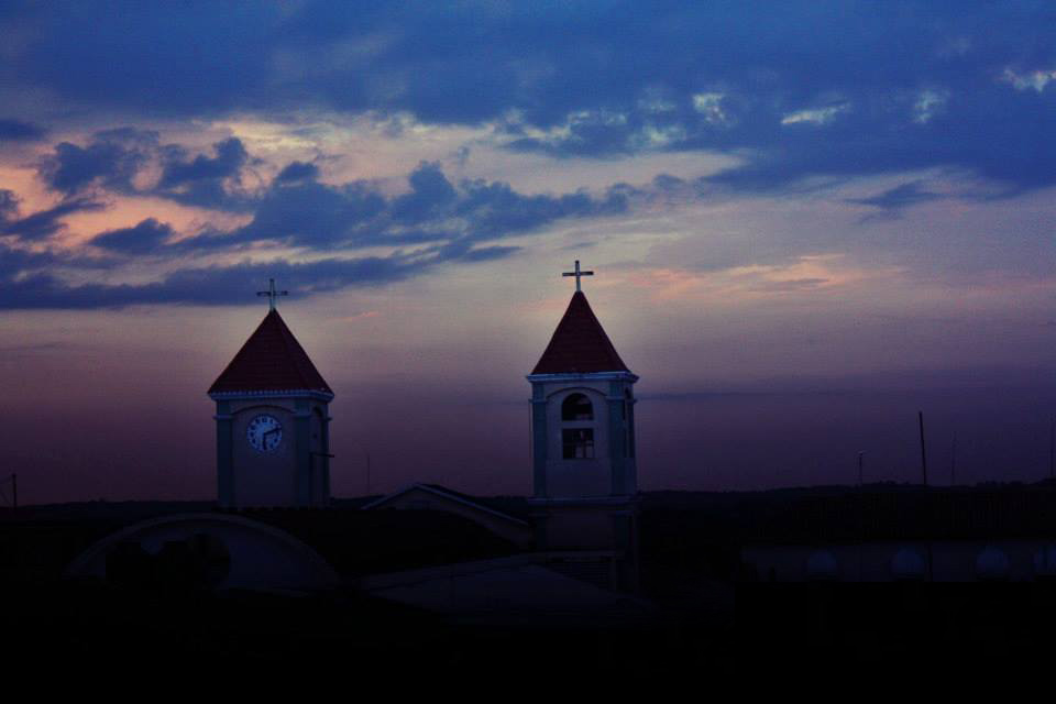 Atardecer